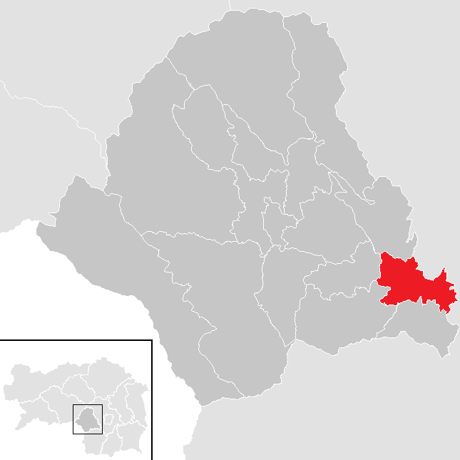 Lage von Söding-Sankt Johann im Bezirk Voitsberg